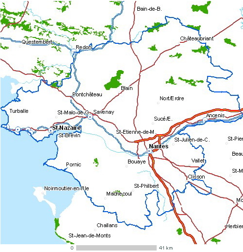 Carte du département Loire-Atlantique Légende